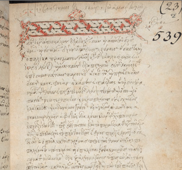 Евсевий. Церковная история. Греческая рукопись первой половины XVI века. Британская библиотека.